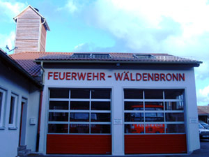 Gerätehaus der Freiwilligen Feuerwehr Esslingen Abteilung Wäldenbronn. Das Gerätehaus befindet sich in der Stettener Straße 31 in Esslingen am Neckar. Bildquelle: Florian Kaumeyer